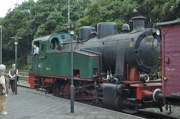 Sommer 2005, das ist von mir aufgenommen. Als Geschenk für Wiki. Ich erhebe keinen Anspruch auf das Copyright. Es wäre jedoch nett, wenn jamand das Foto für etwas benutzen will was Geld bringt, einen Teil davon an Wikipedia weiter zu leiten. De Uli